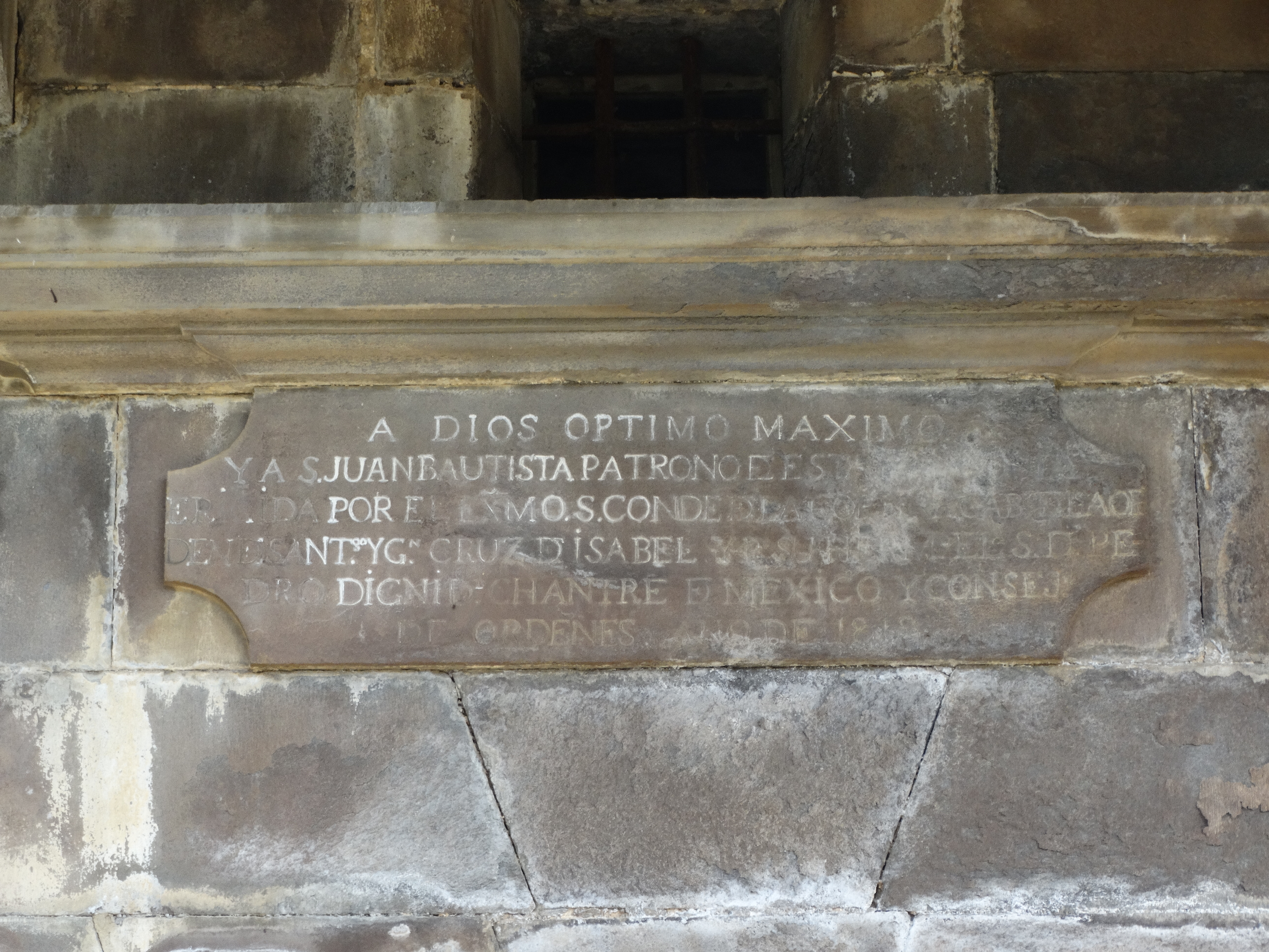 Salarzón es una localidad del municipio de Cillorigo de Liébana, en la comarca de Liébana (Cantabria, España). Iglesia neoclásica de principios del siglo XIX mandada construir por el conde de la Cortina Vicente Gómez de la Cortina y Salceda. Placa dedicatoria en el dintel.